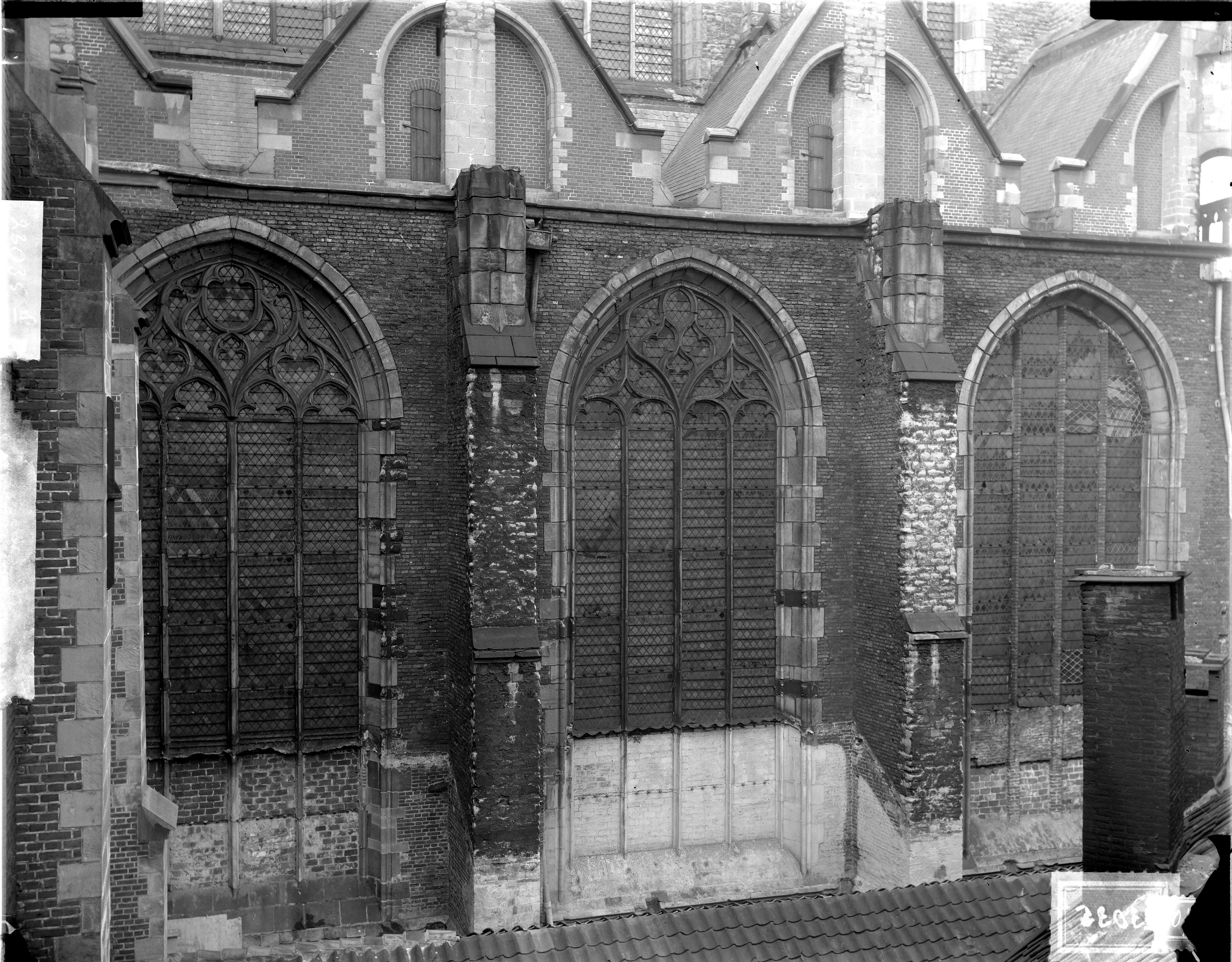 Details van muren en ramen, noordzijde van het schip.